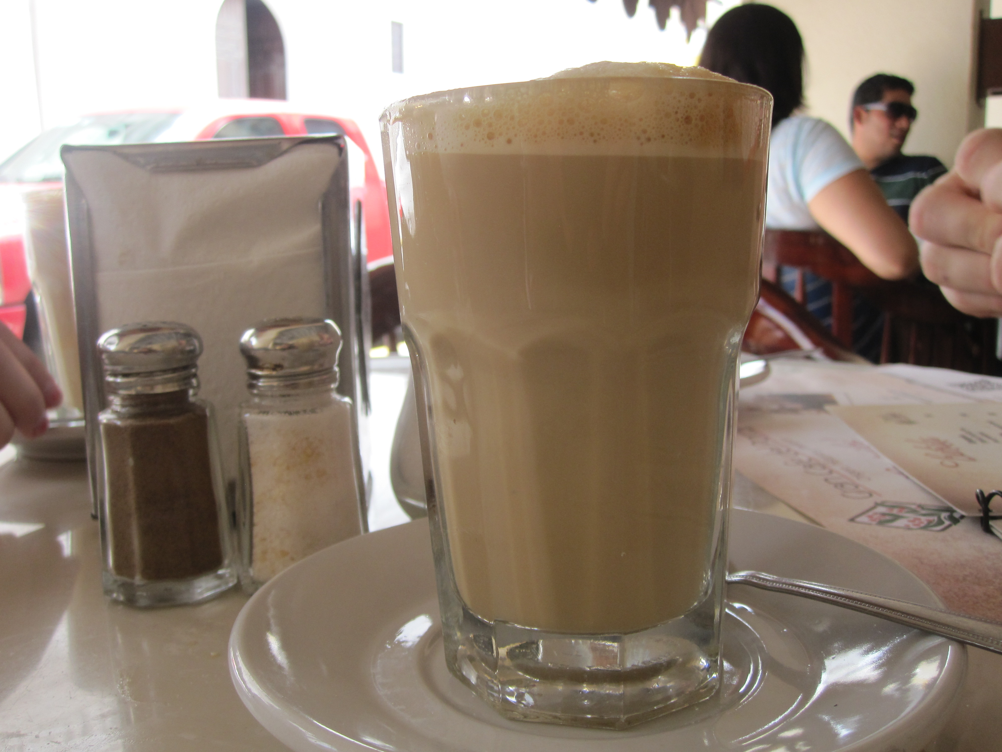 På bilden kan vi se en mexikansk kaffedryck som serveras genom att servitören vid bordet häller upp varm mjölk med långt avstånd från glaset. Drycken påminner om kaffe latte och är ljusbrun till färgen. Till vänster om glaset står två kar med salt och peppar. Glaset står på ett vitt fat och till höger om glaset på fatet ligger en sked.